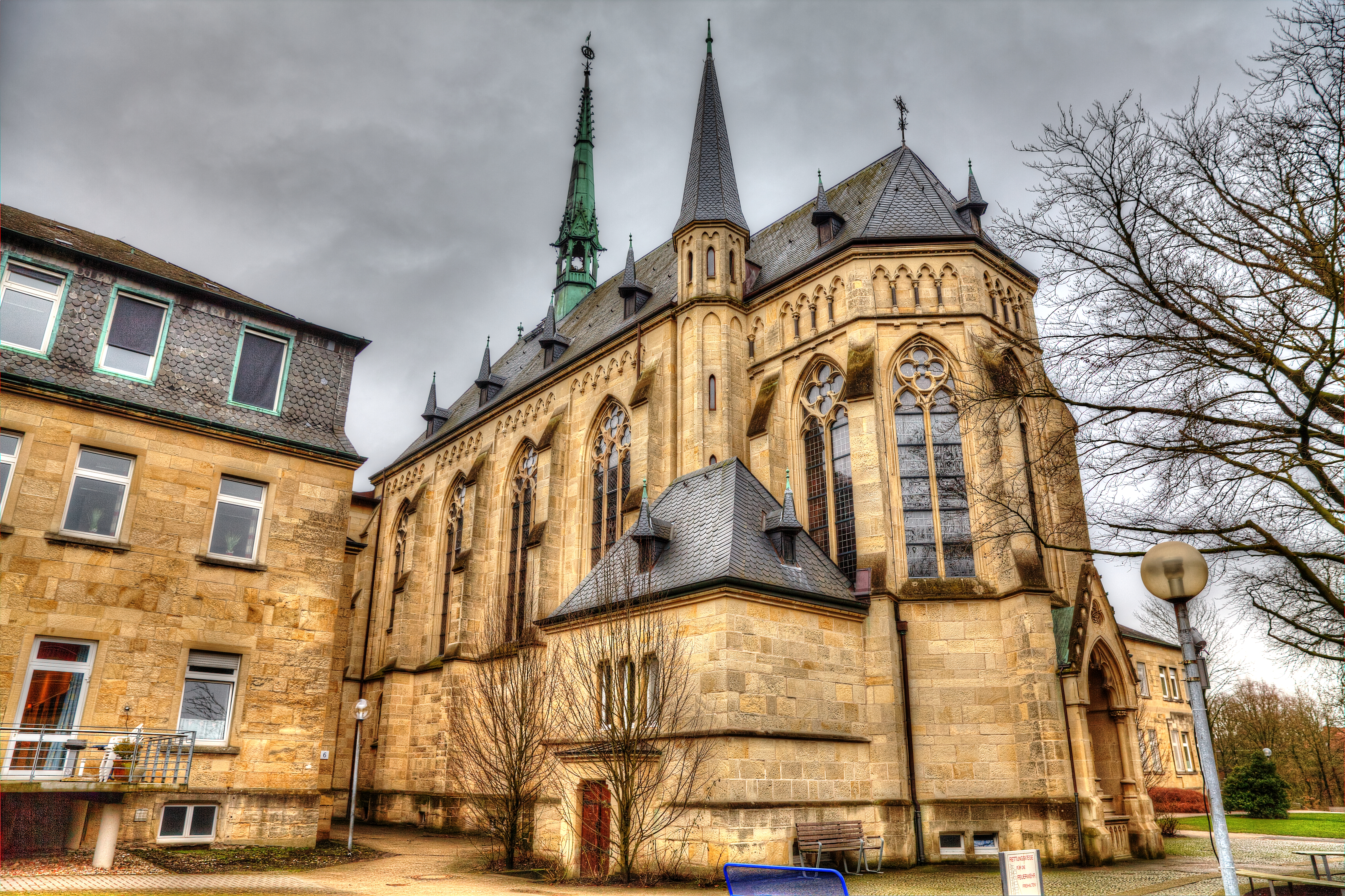 Kapelle Stift Tilbeck